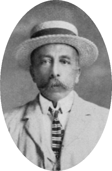 D-ro Gust. Busutil L. K., Malta, prezidanto de l' Grupo de Malta.